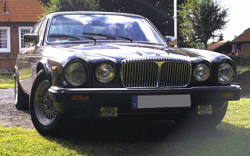 Daimler Double Six (Front mit - geriffeltem - Daimer Kühlergill)